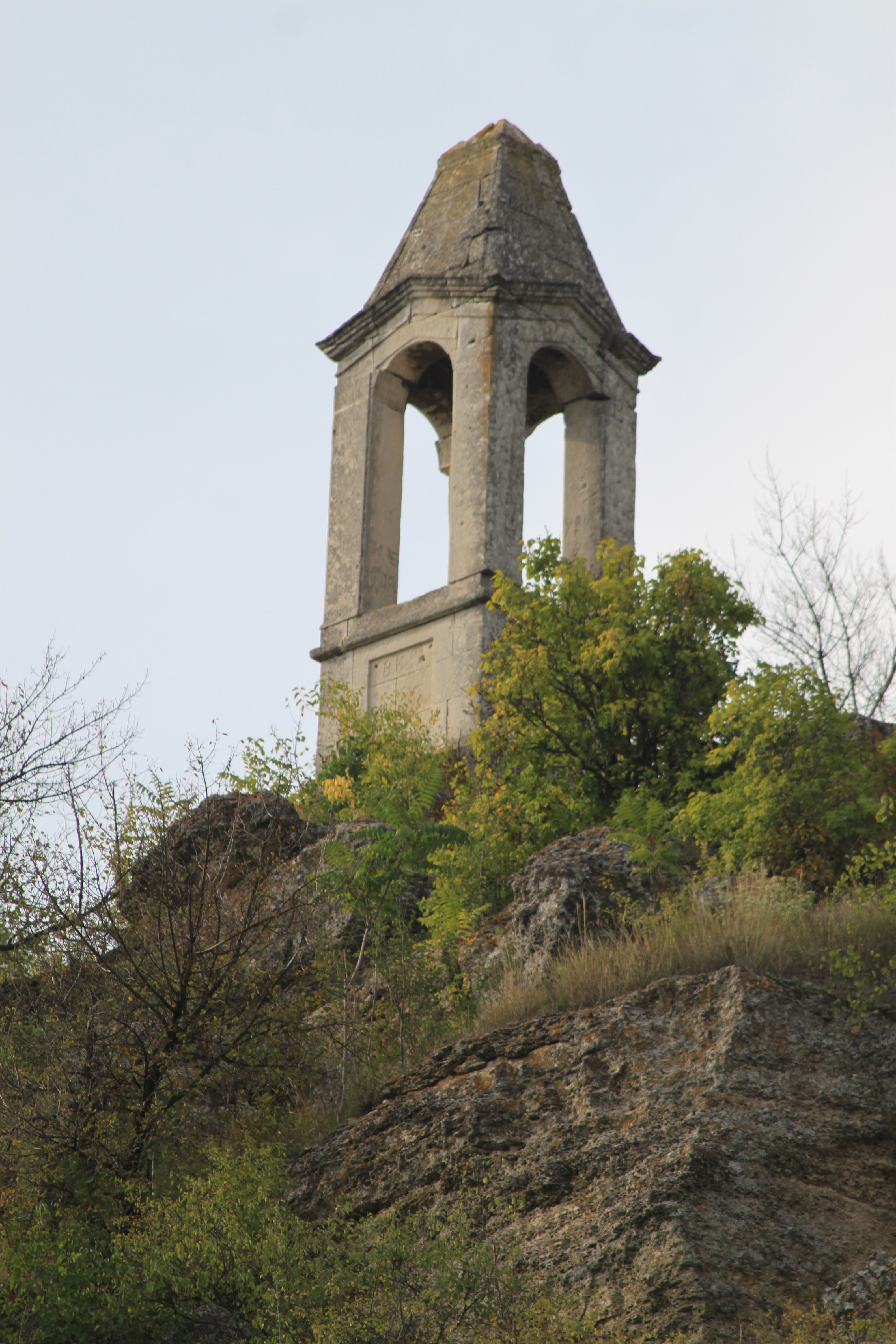 Башня ветров в селе Строенцы, Приднестровье